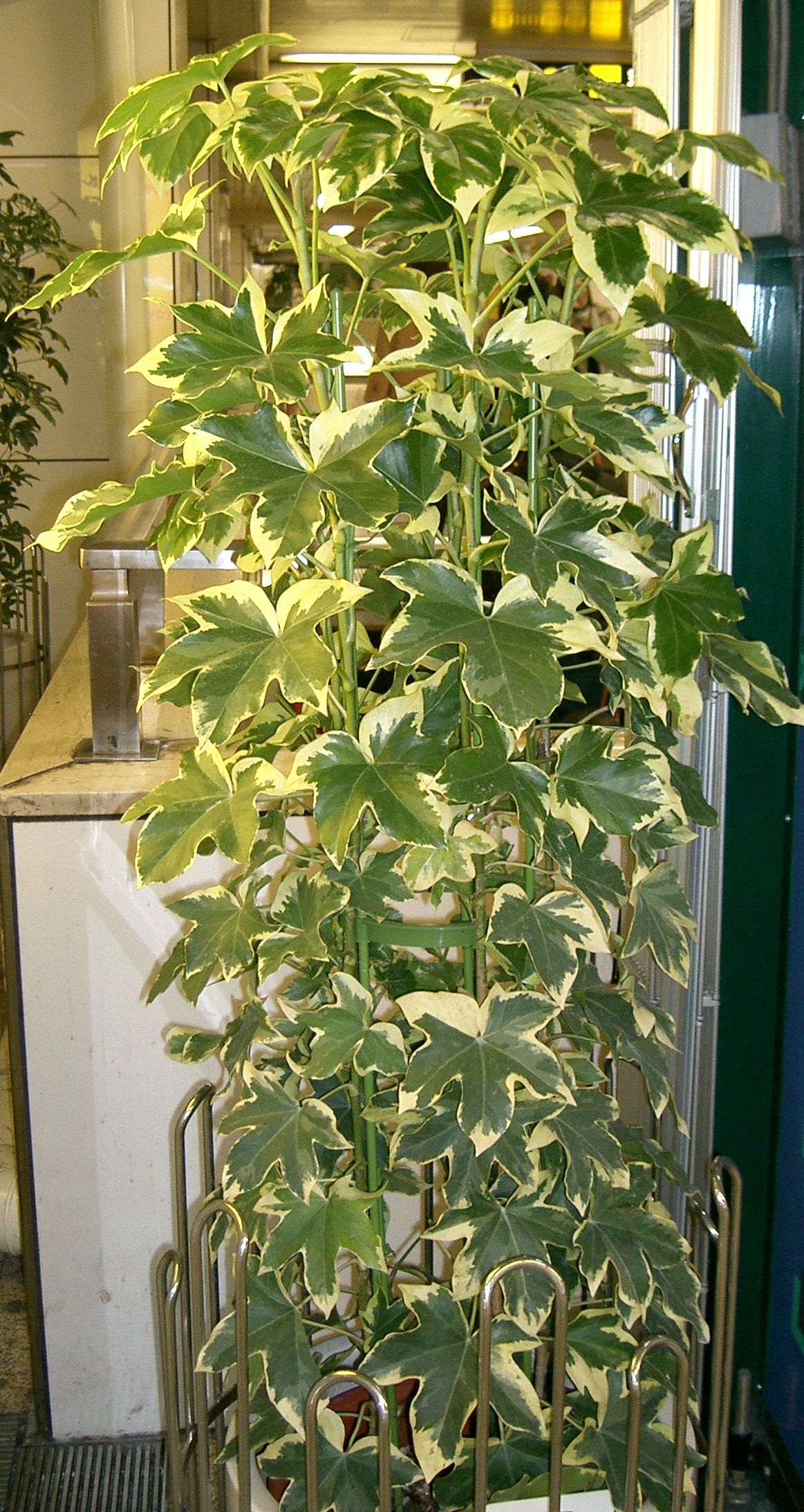 x Fatshedera lizei